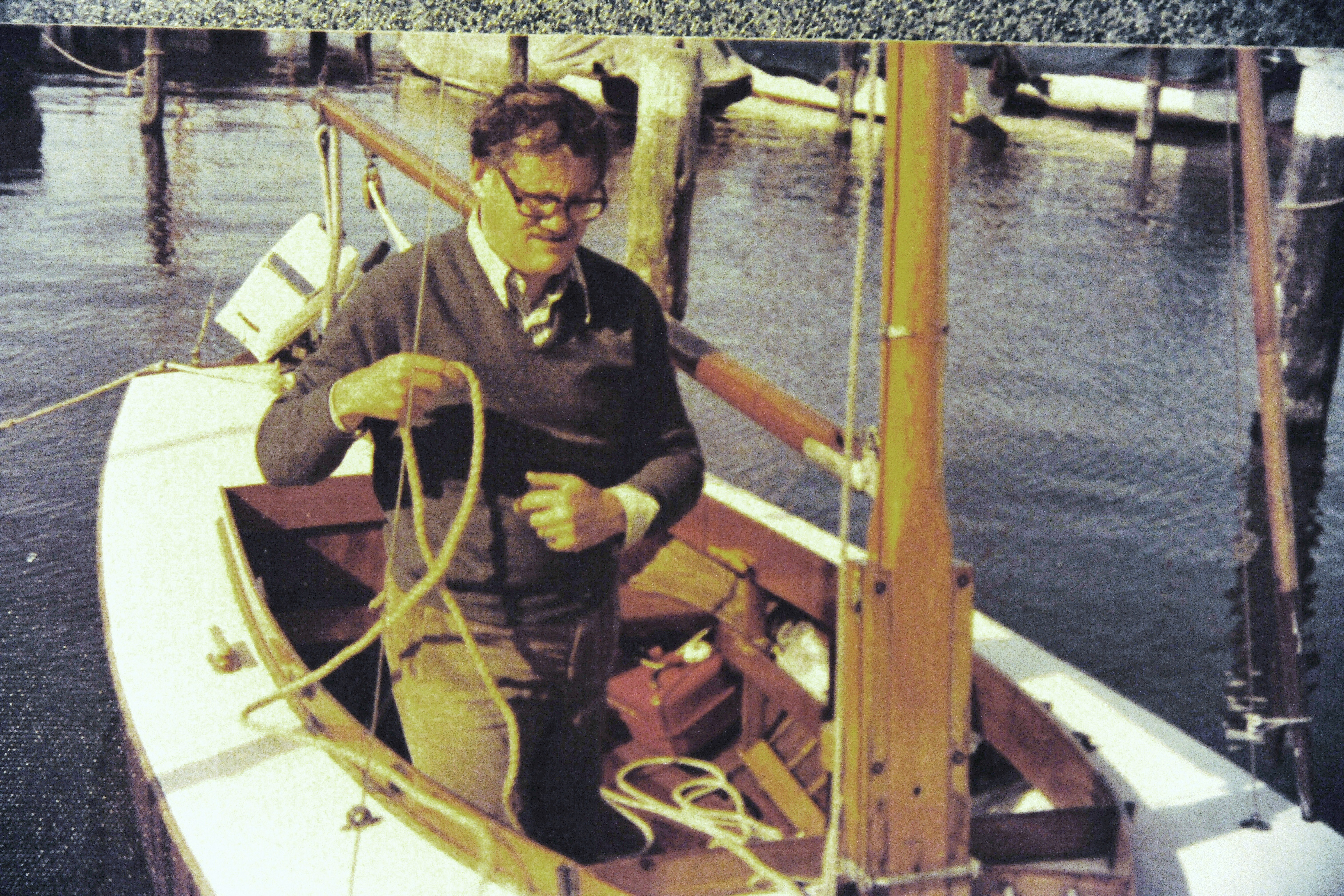 Max Schuchart, MBE (Rotterdam, 16 augustus 1920 - Den Haag, 25 februari 2005) was een Nederlandse dichter, literatuurcriticus, journalist en vertaler. Ook was hij redacteur van het tijdschrift Proloog en van het Handelsblad.